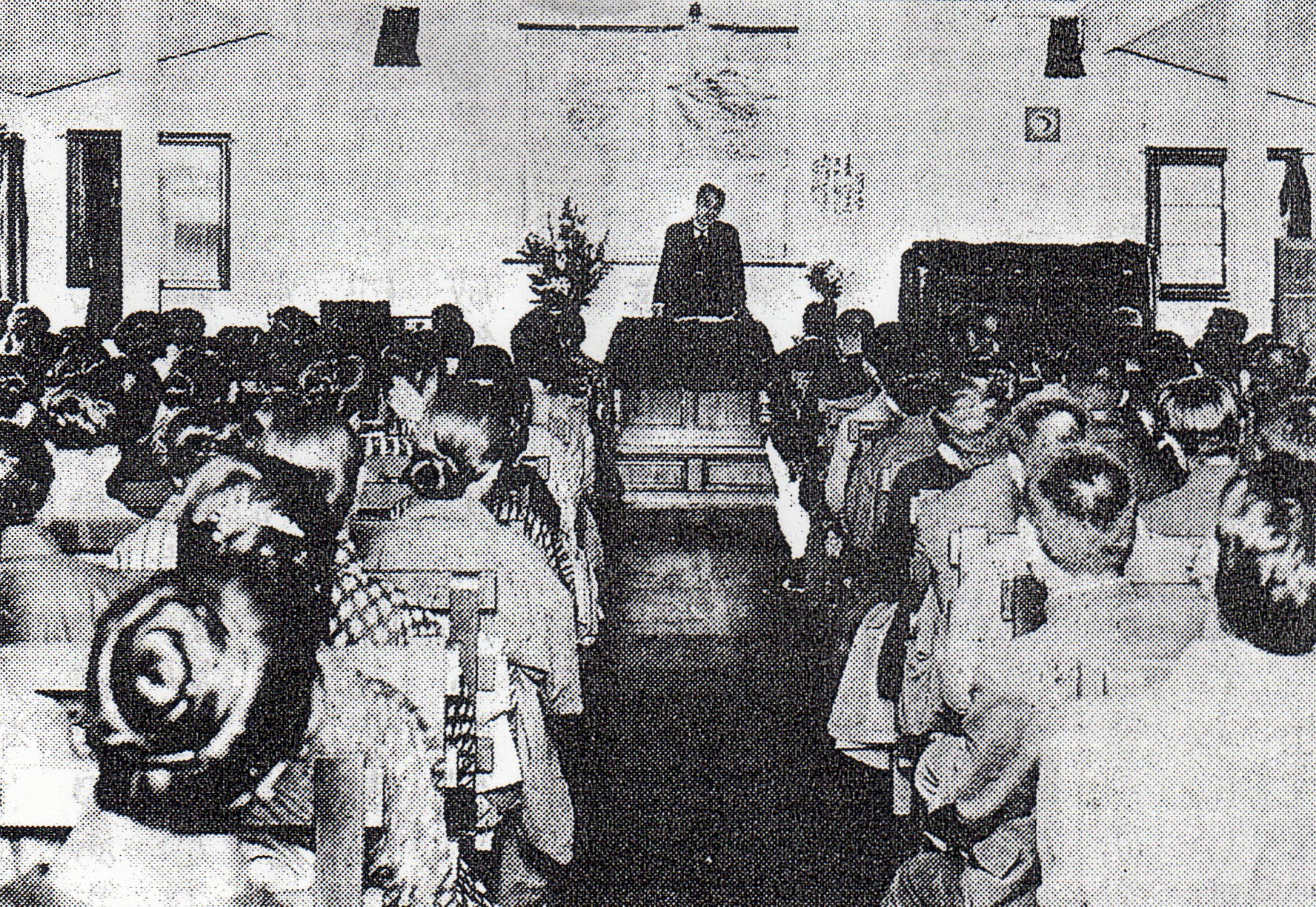 内村鑑三による1924年6月15日の聖書講演会